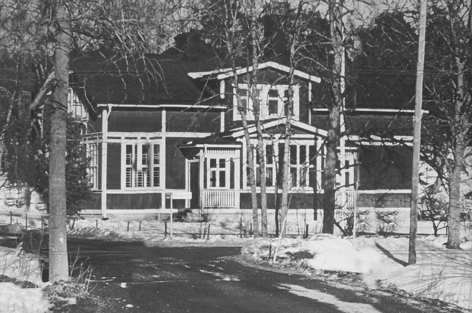 Södertörnsskolan, senare Farsta skola